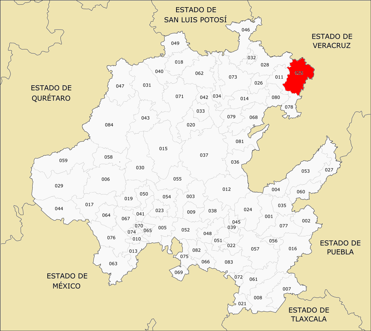 Municipios de Hidalgo